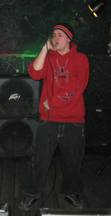 == Licenc: ==